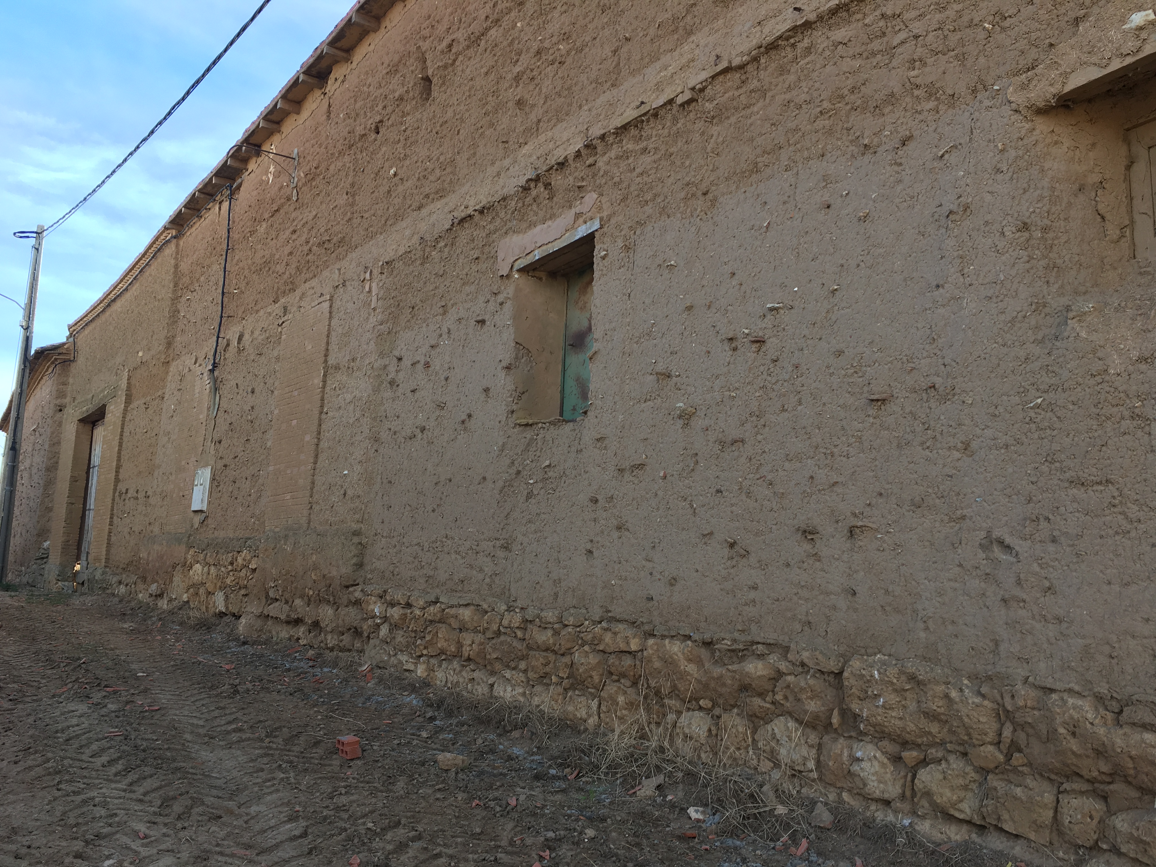 Villaesper Milenario